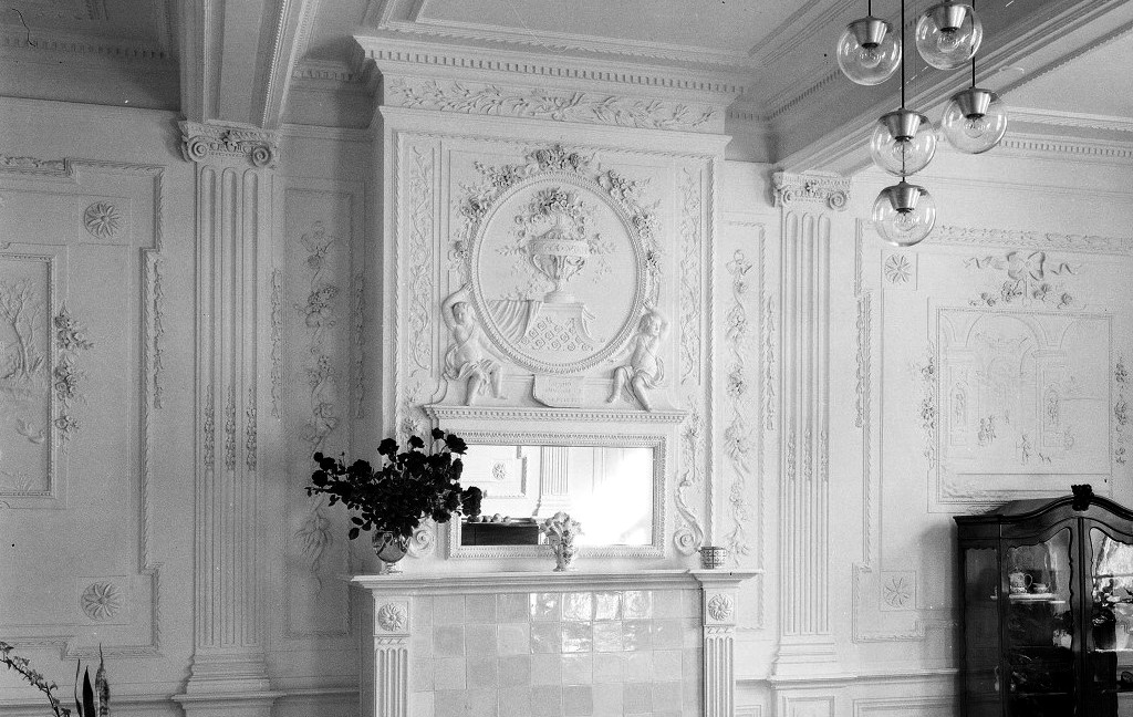 Sierstucwerk P.N. Cagini, salon Huis Eyll, Maastricht (Heer)